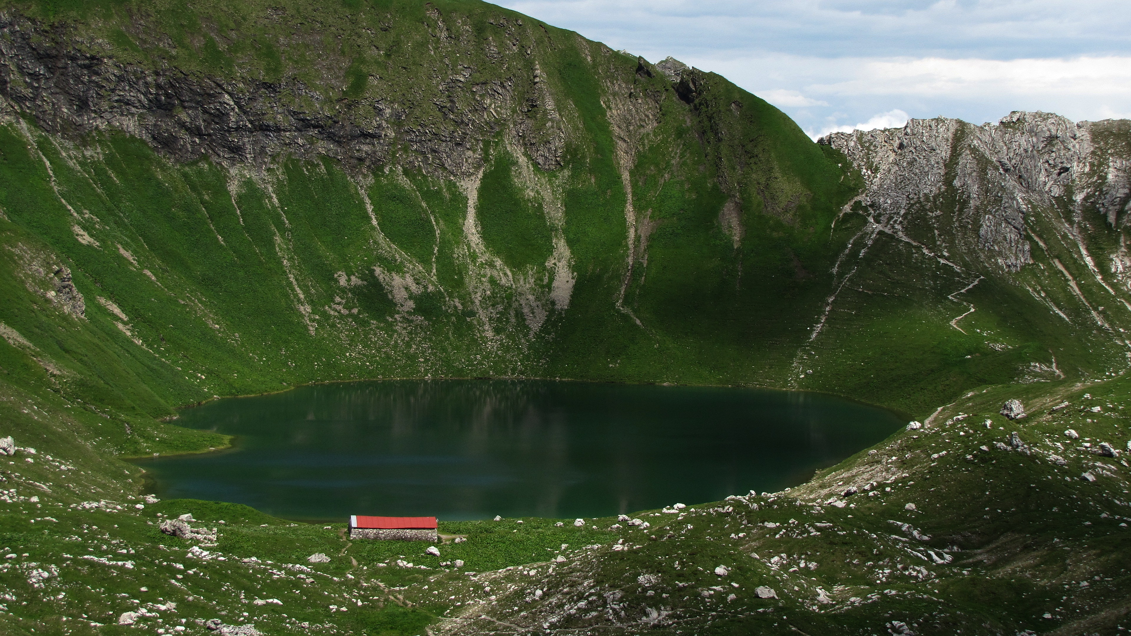 Blick aus Südwesten über die Seehütte auf den Engeratsgundsee (1876 m).